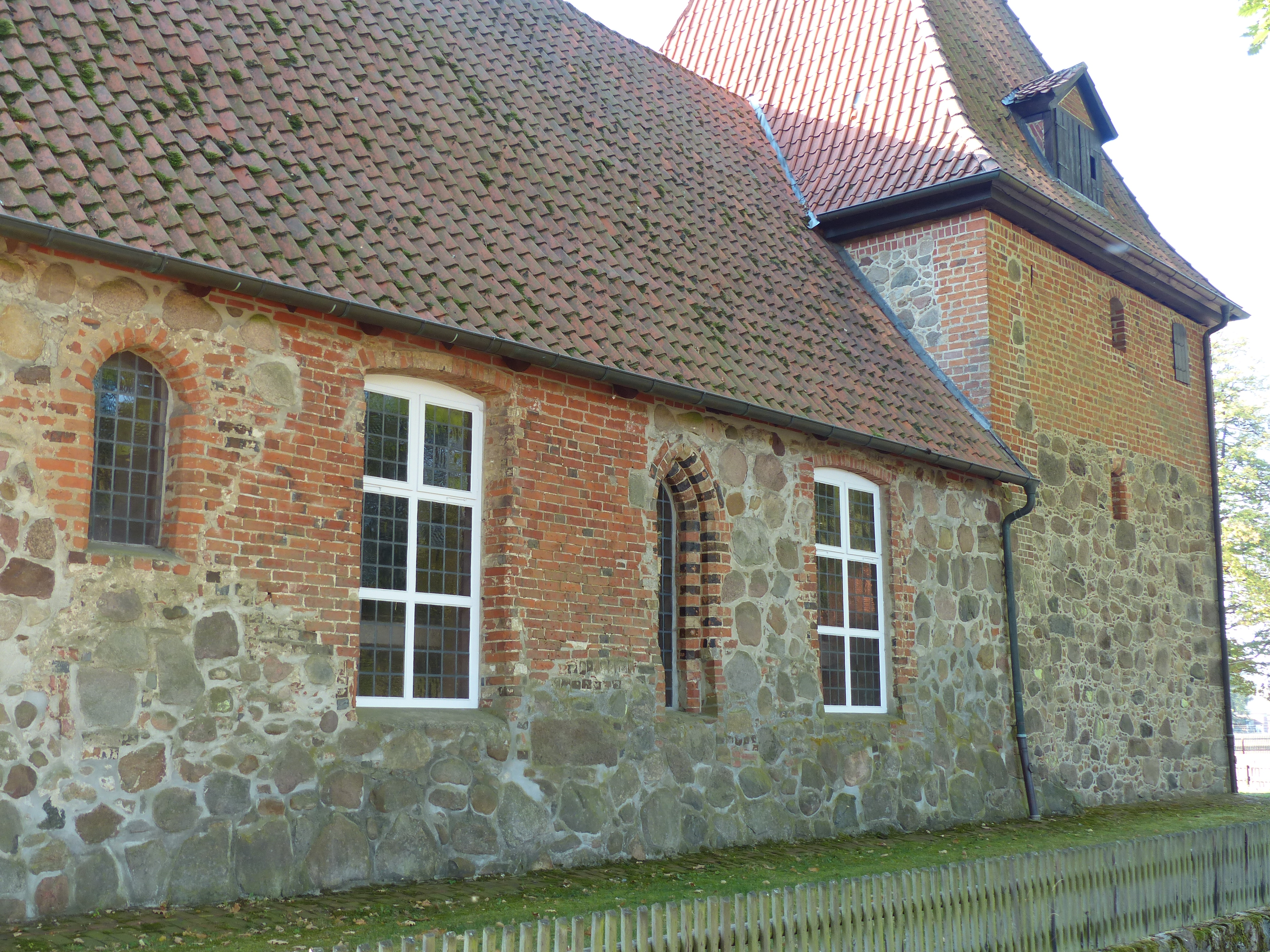 Christophoruskirche in Sprakensehl von Nordosten